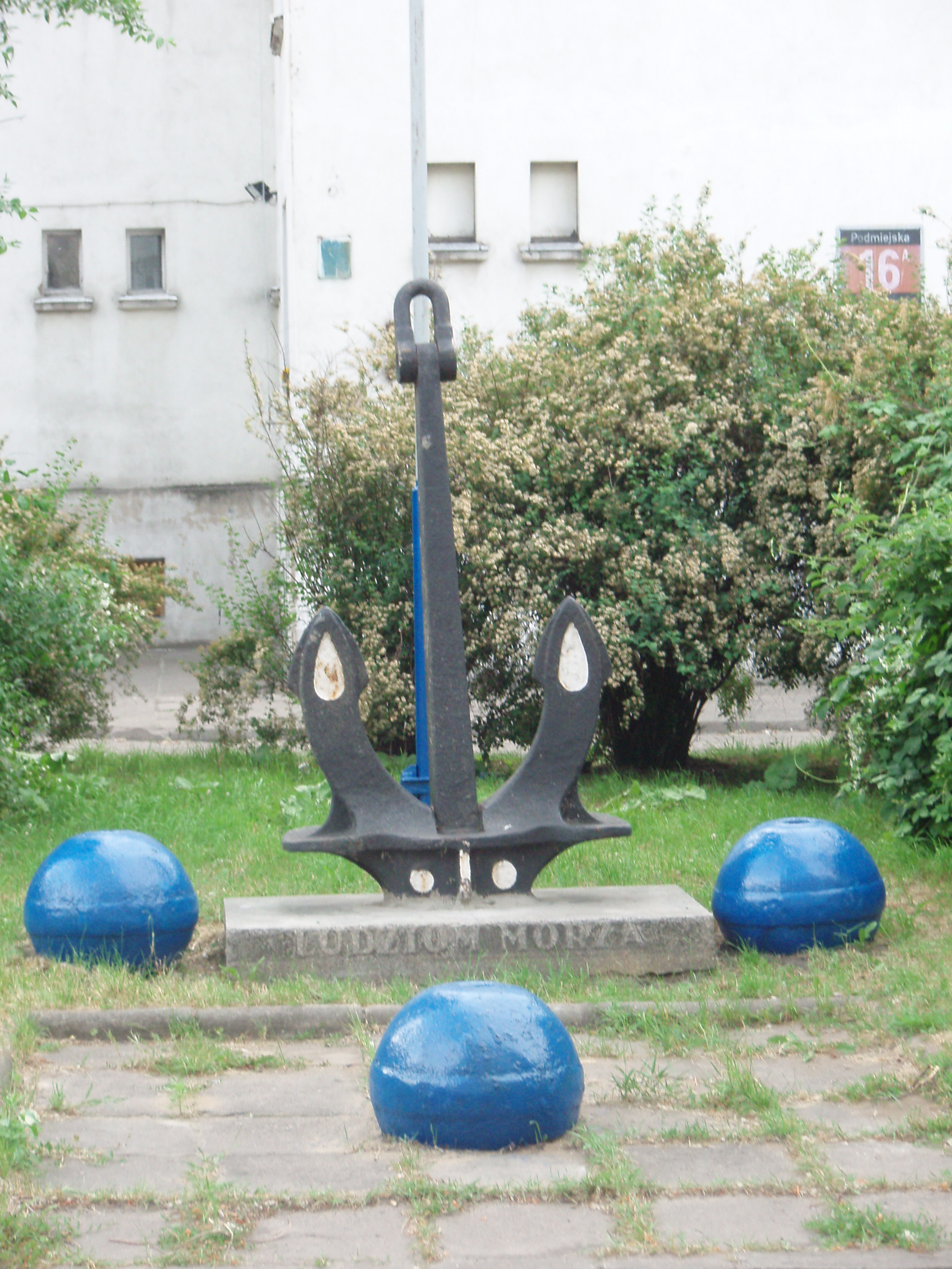 Pomnik Ludziom Morza przy ul. Podmiejskiej 16 w Łodzi. Na przeciwko pomnika na ścianie Liceum Ogólnokształcącego widnieje tablica: W hołdzie wiceadmirałowi Z. Studzińskiemu 1922 - 1976, Dni Morza 86 - Łodzianie, Wiceadmirałowi K. Porębskiemu 1872 - 1933, Łódź, Dni Morza 84, - Członkowie Ligi Morskiej